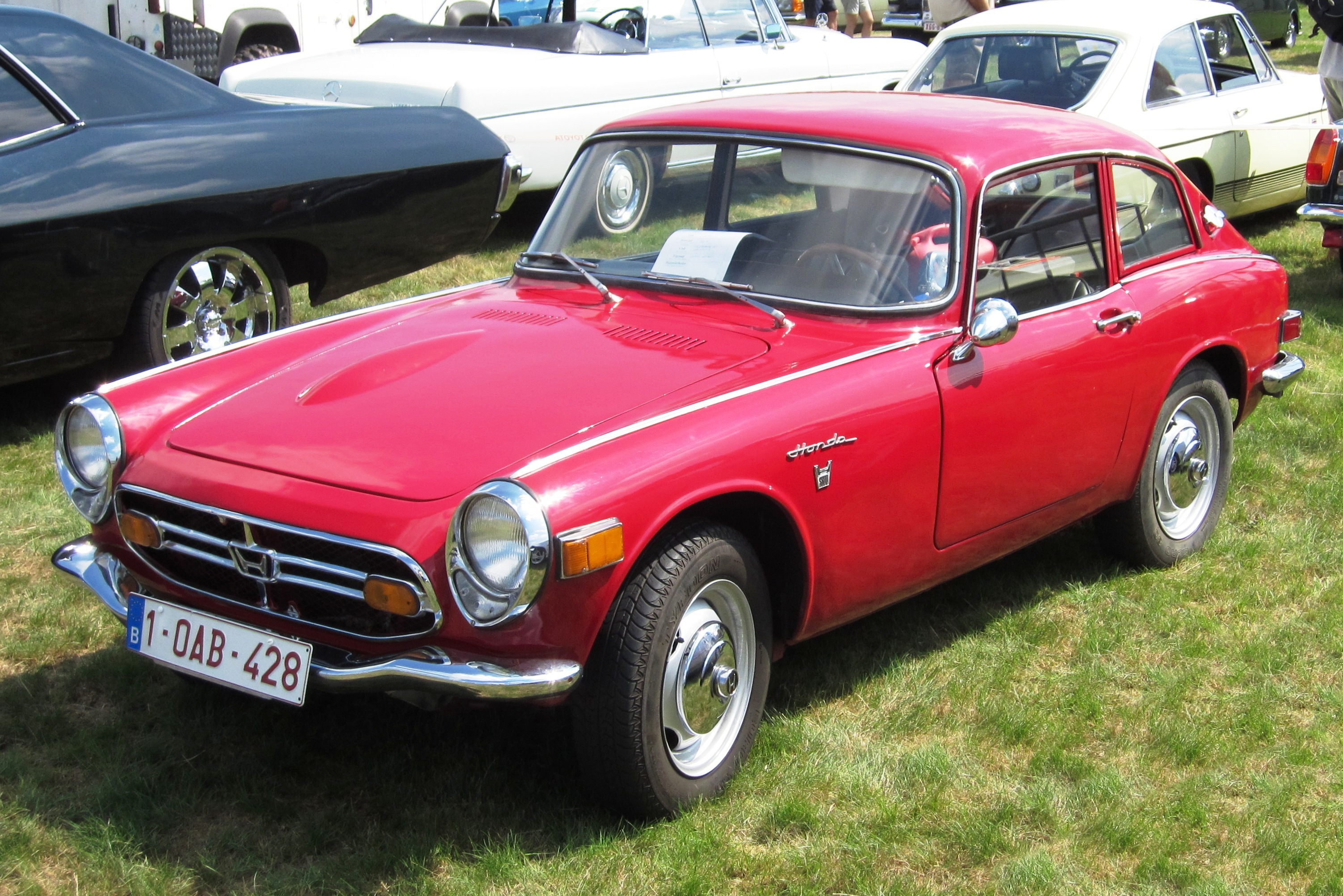 Honda S800 en Belgique